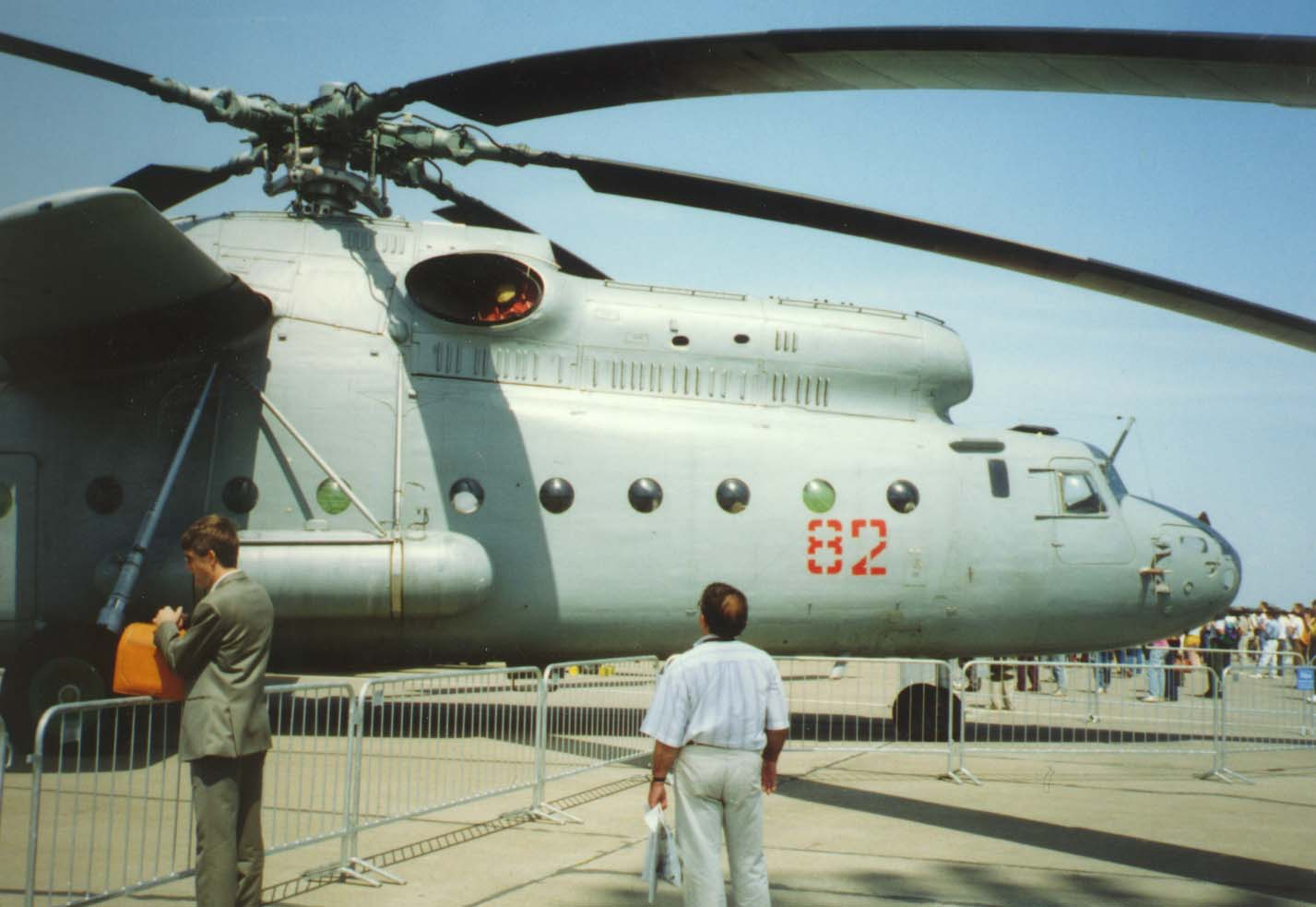 Mil-6